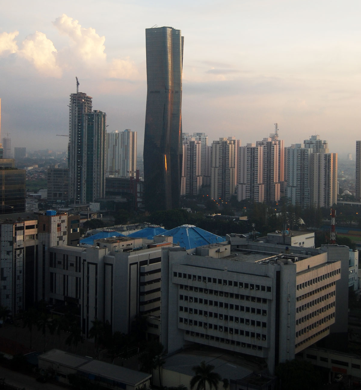 daerah rasuna kuningan di pagi hari